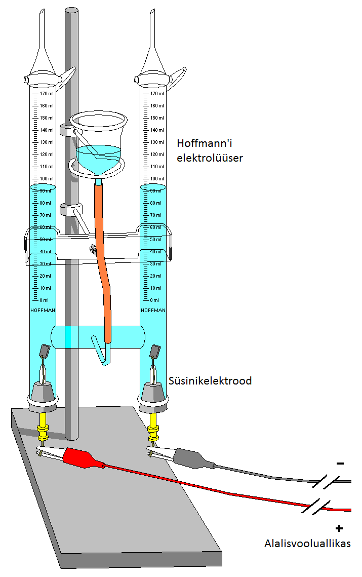 Hoffmann'i elektrolüüsiaparaat